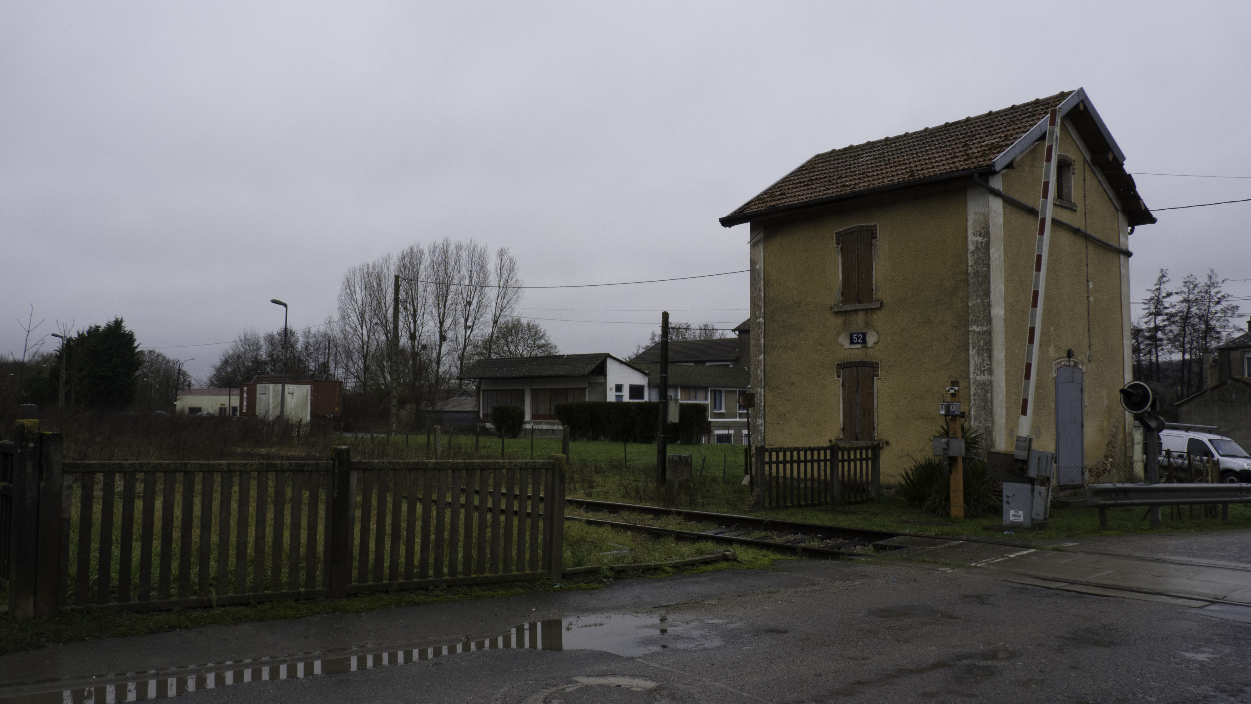 Gare de Saint-Siméon, 2 ans après